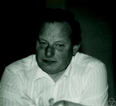 Foto di Stan Ackermans